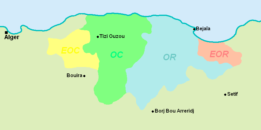 Carte de localisation des différents dialectes de la langue kabyle, selon K. Naït-Zerrad, « Kabylie : Dialectologie », dans : Encyclopédie Berbère vol. 26 (EdiSud, 2004), pp.4067-4070 (lire en ligne)